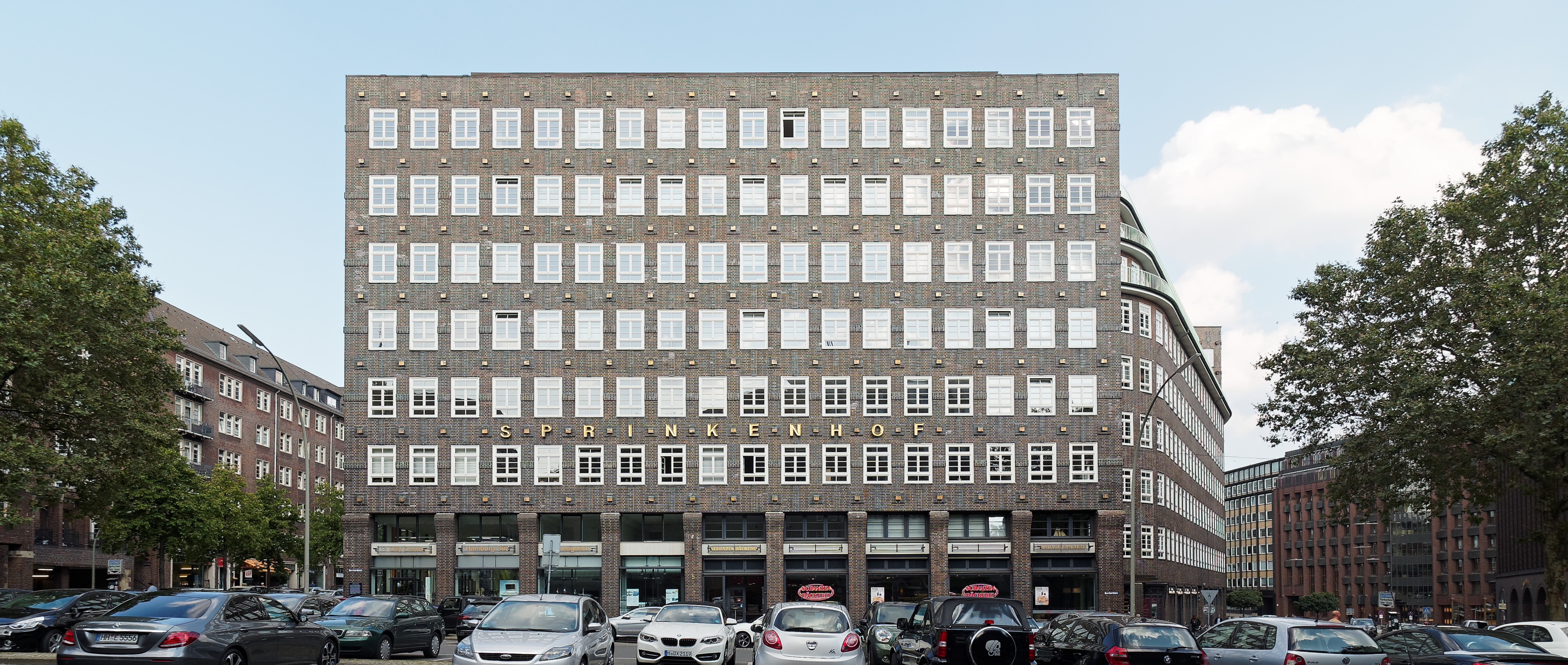 Die westlich Seite des Sprinkenhofes im Kontorhausviertel in Hamburg) This is a photograph of an architectural monument.